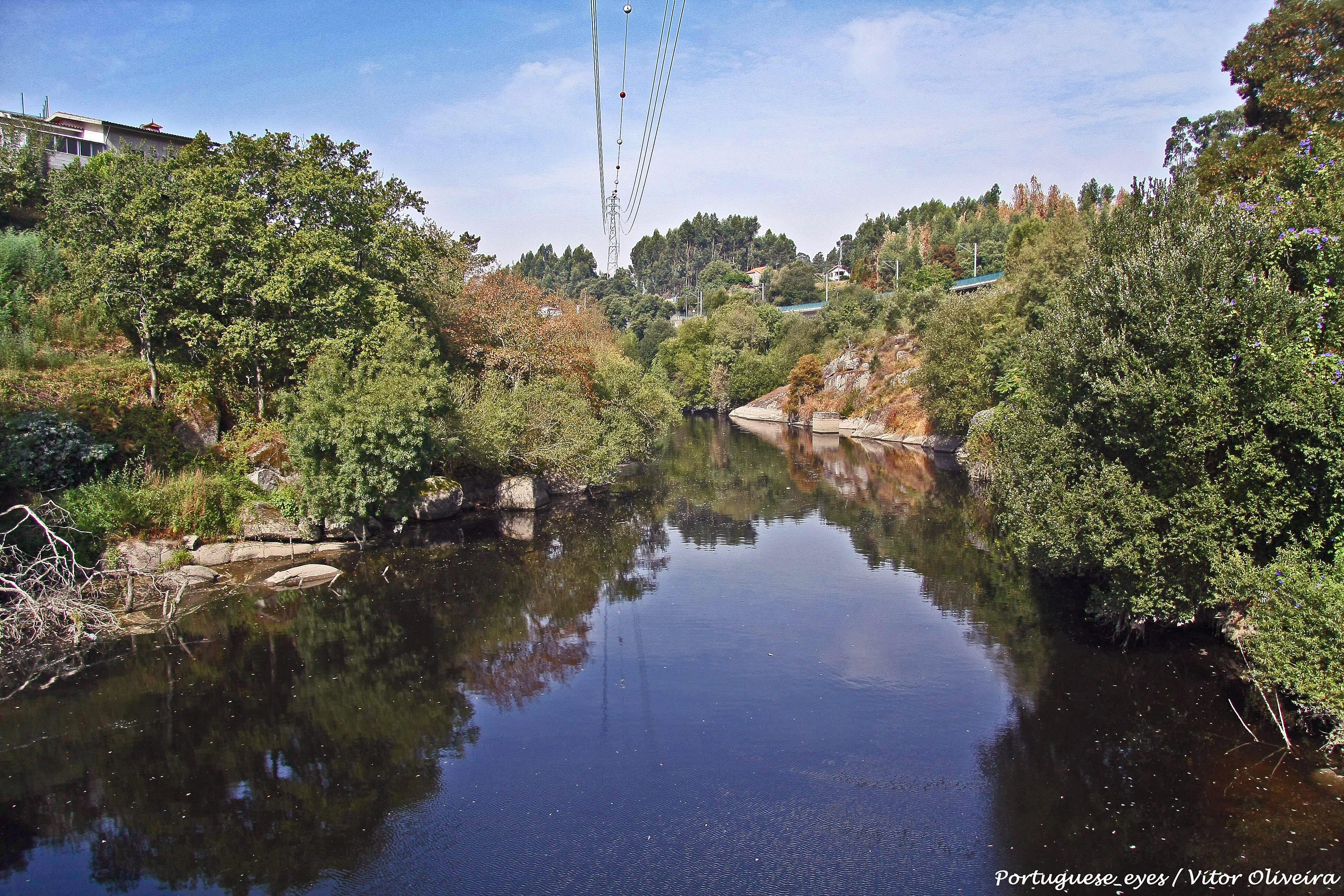 Rio Ave - Portugal 🇵🇹